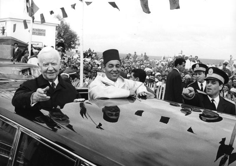 März 1966 Staatsbesuch Bundespräsident Dr. Heinrich Lübke (li.) in Marokko rechts: King Hassan II.